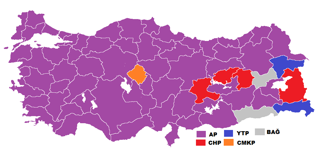 1965 genel seçimleri sonuçlarının Türkiye haritasında gösterimi